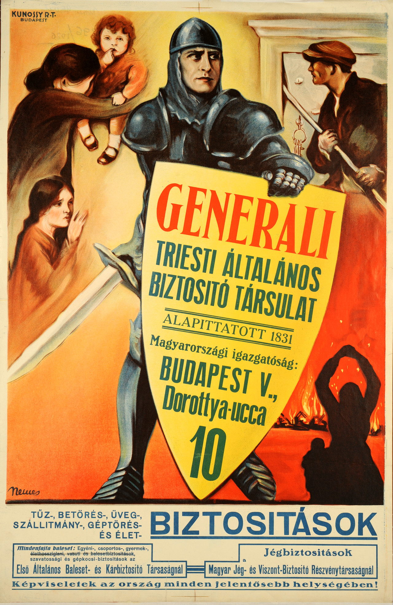 Generali Triesti Általános Biztosító Társulat reklámplakátja